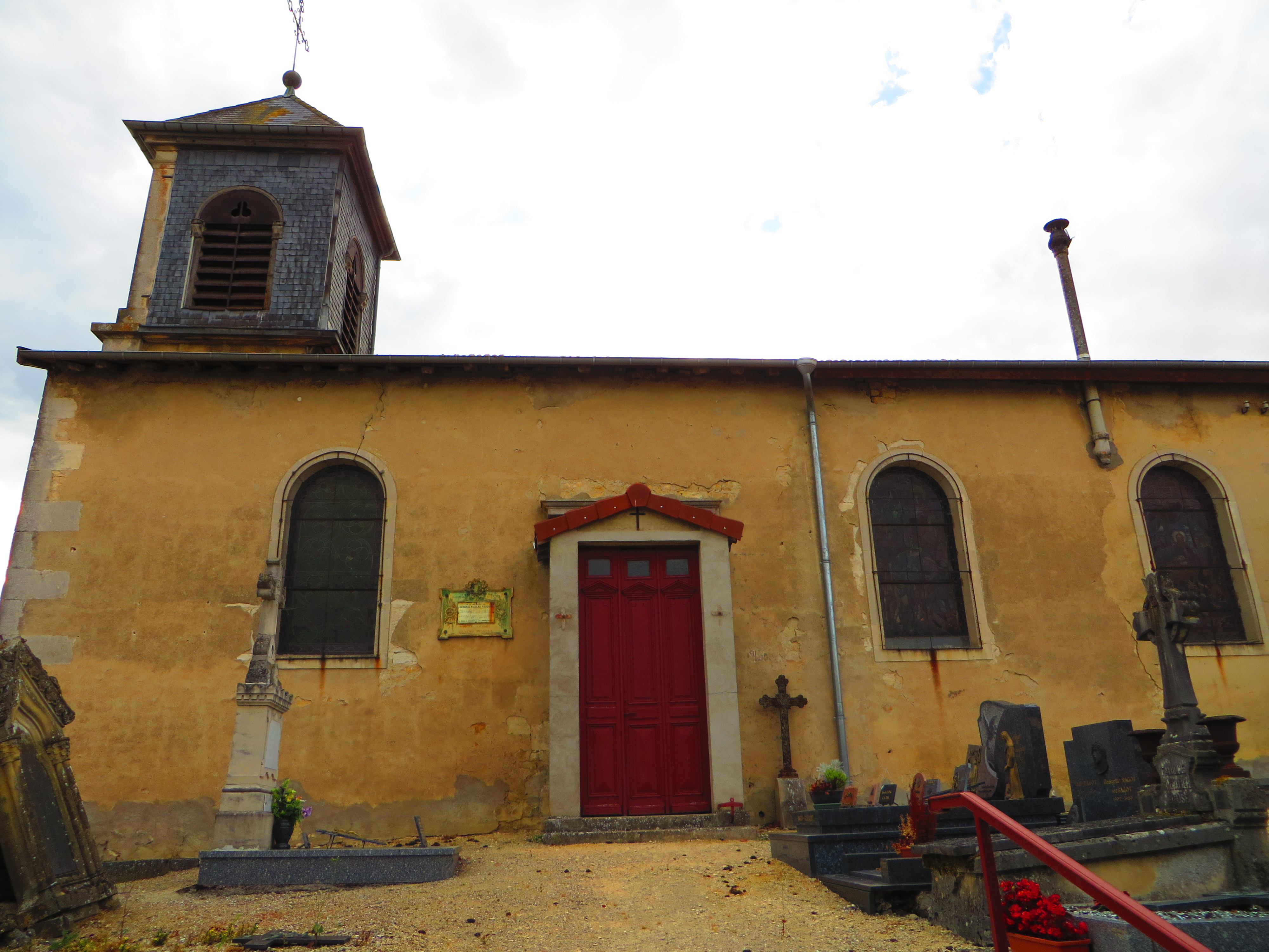 Avillers-Sainte-Croix L'église Sainte-Croix